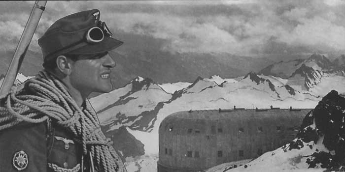 Немецкие горные стрелки на приюте одиннадцати. Фото 1942 года